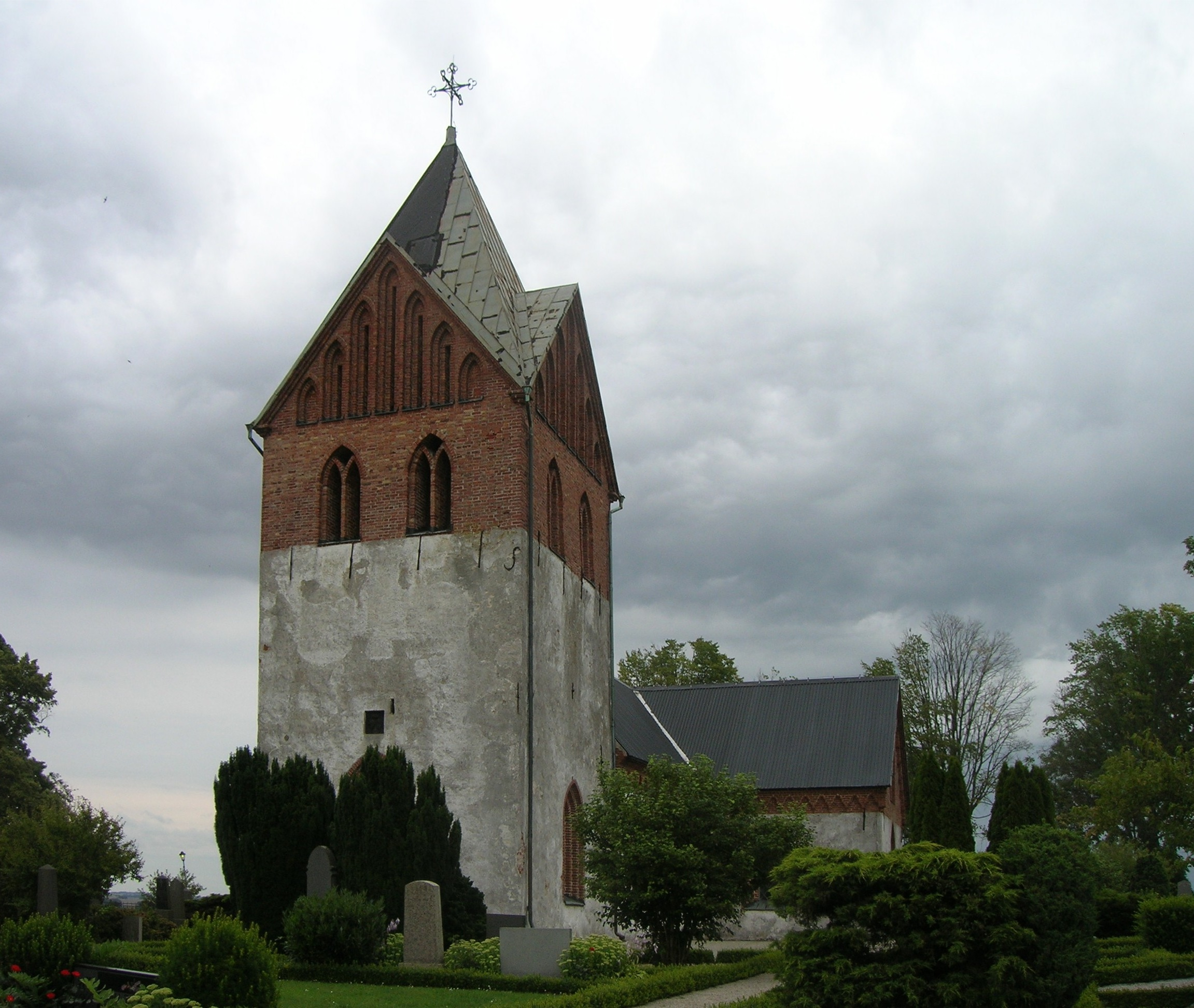 Odarslöv Church